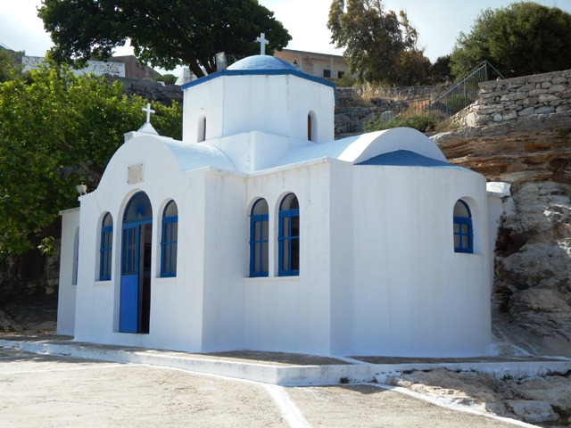 Αγία Άννα